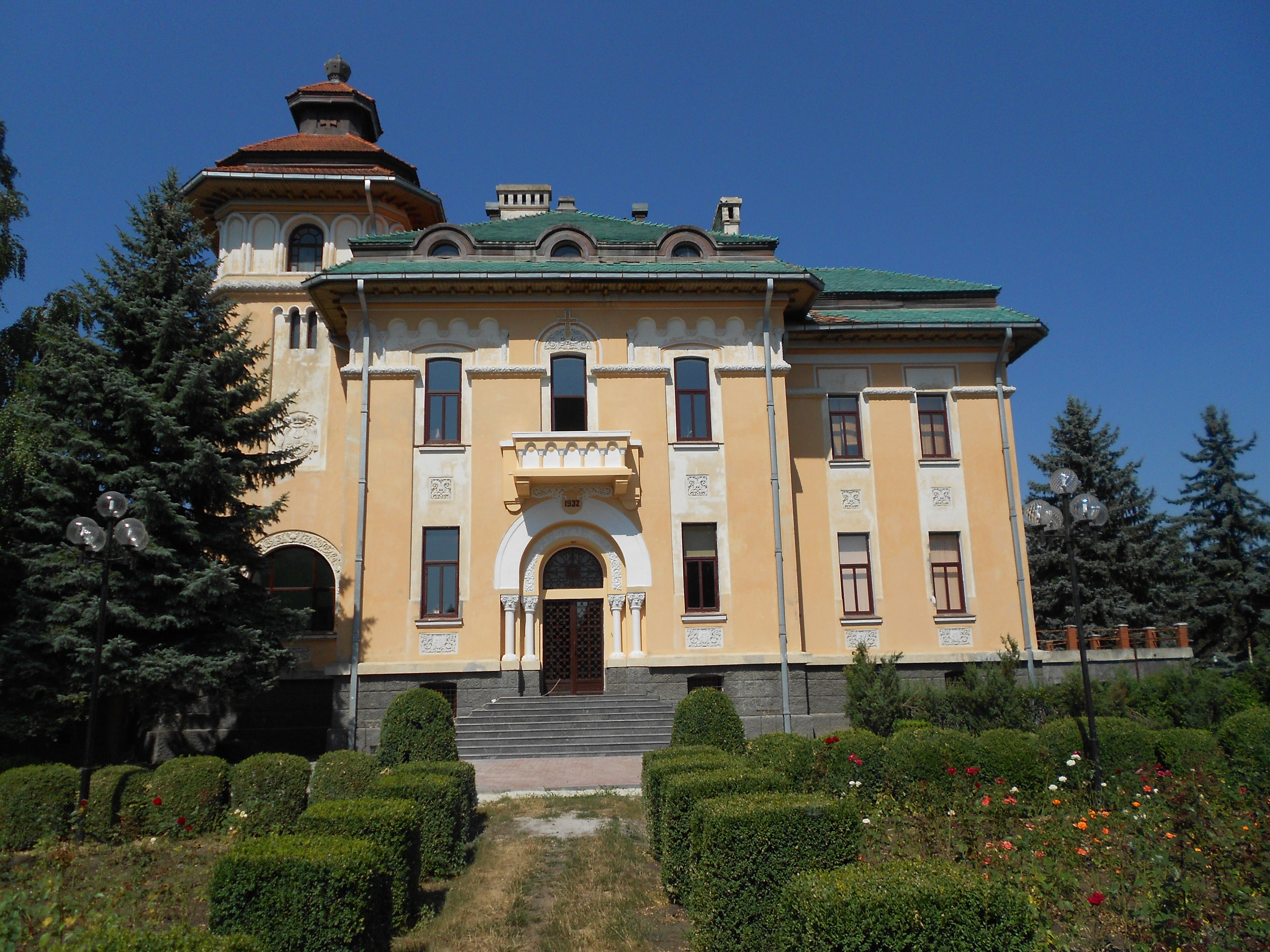 Reședința fostei Episcopii a Hotinului din Bălți